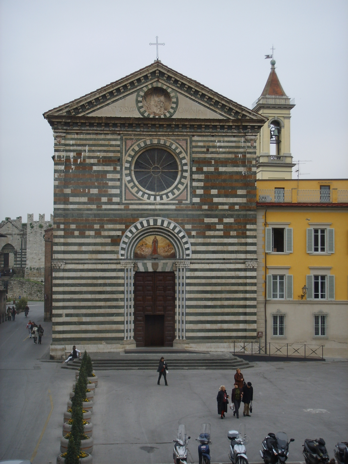 Prato, chiesa di san francesco